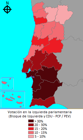 Resultados dos partidos de esquerda representados no parlamento (BE e CDU), por distrito.